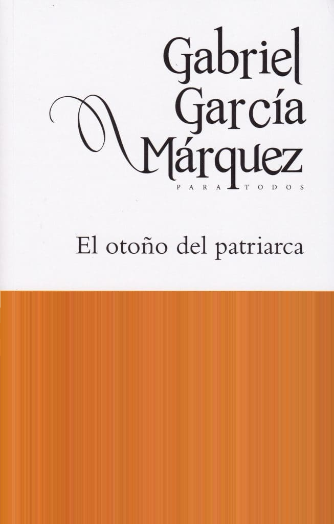 Versión simplificada de la portada de "El otoño del patriarca" publicada por el Grupo Editorial Norma.